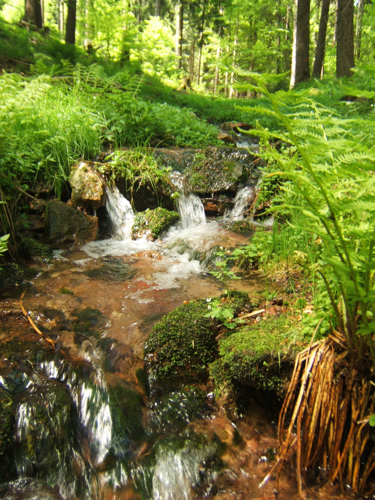 Die Vesser (Fluss) wenige Meter hinter ihrer Quelle